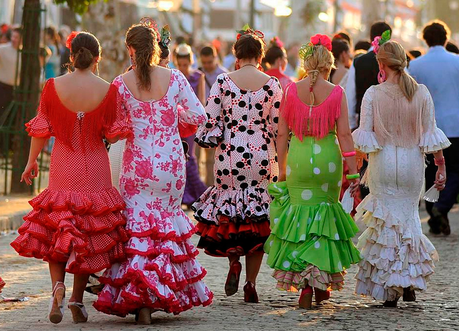 Feria de Abril de 2011 (Sevilla)